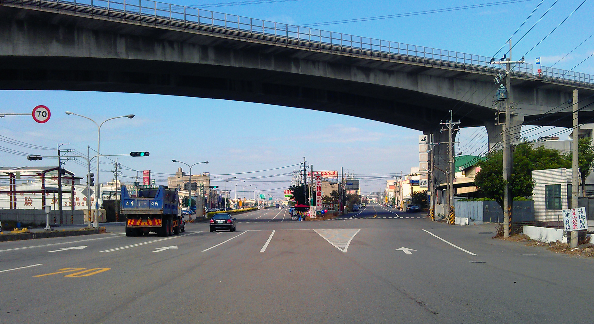 左側道路為臺中市海線的中華路，右側道路為沙田路四段，上層為國道三號